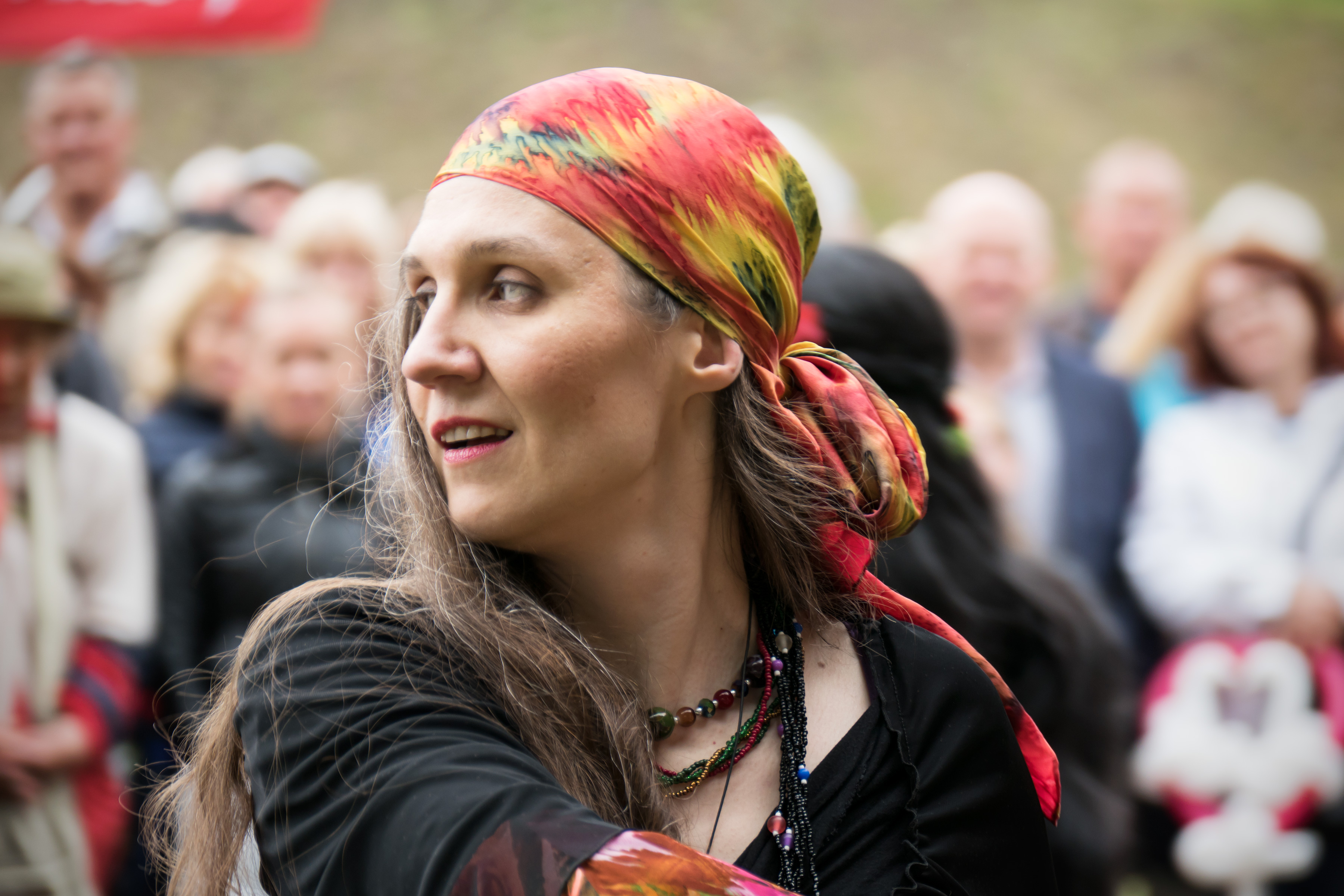 Külli Kressa tantsuansambel Maljarka koosseisus Pärnu hansapäevadel 2017